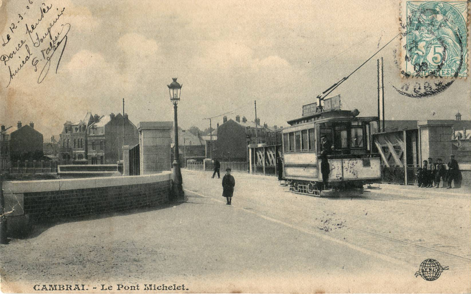 Carte postale éditée par SENCR : CAMBRAI - Le Pont Michelet